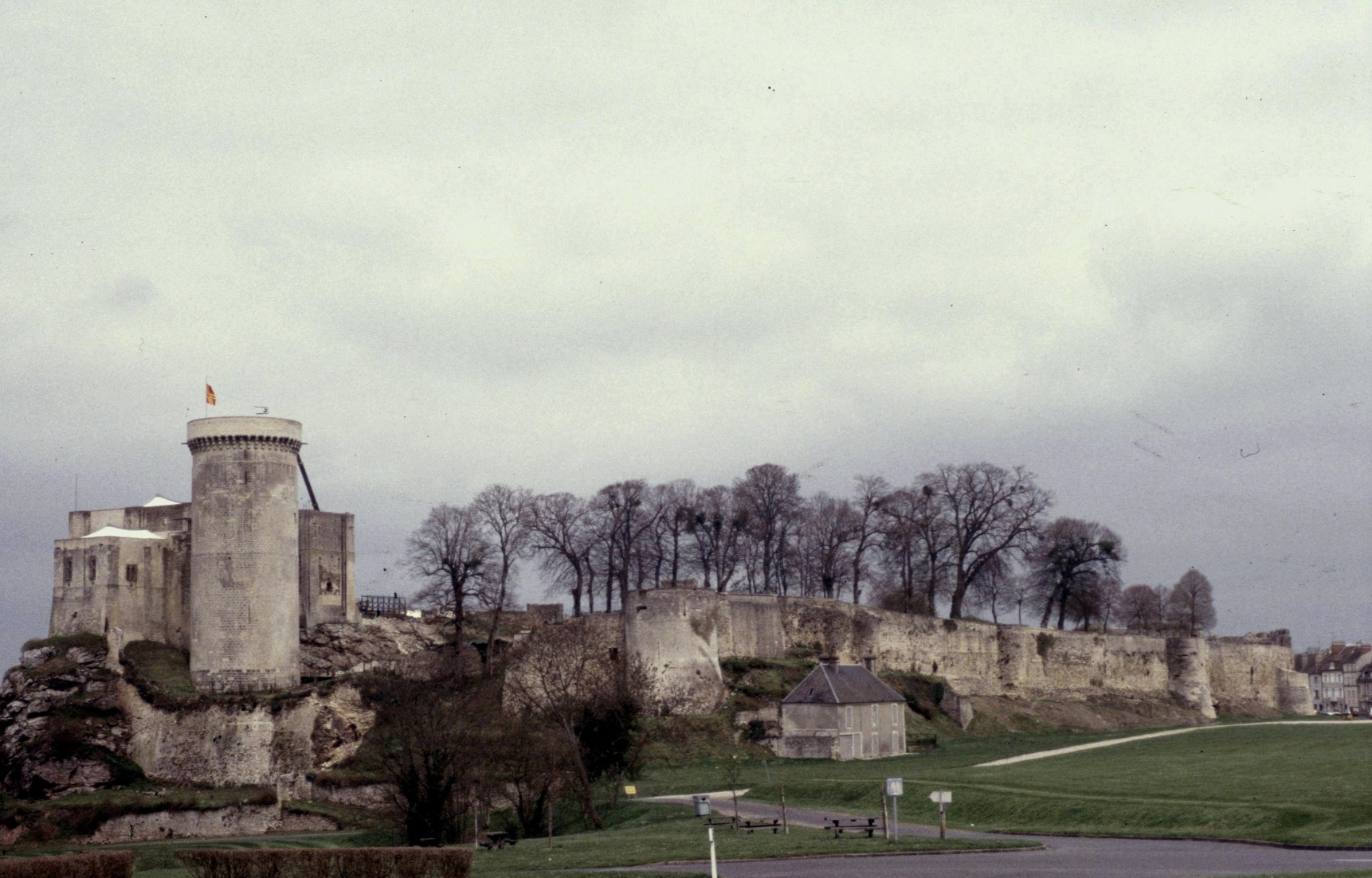 Calvados Falaise Chateau 041996